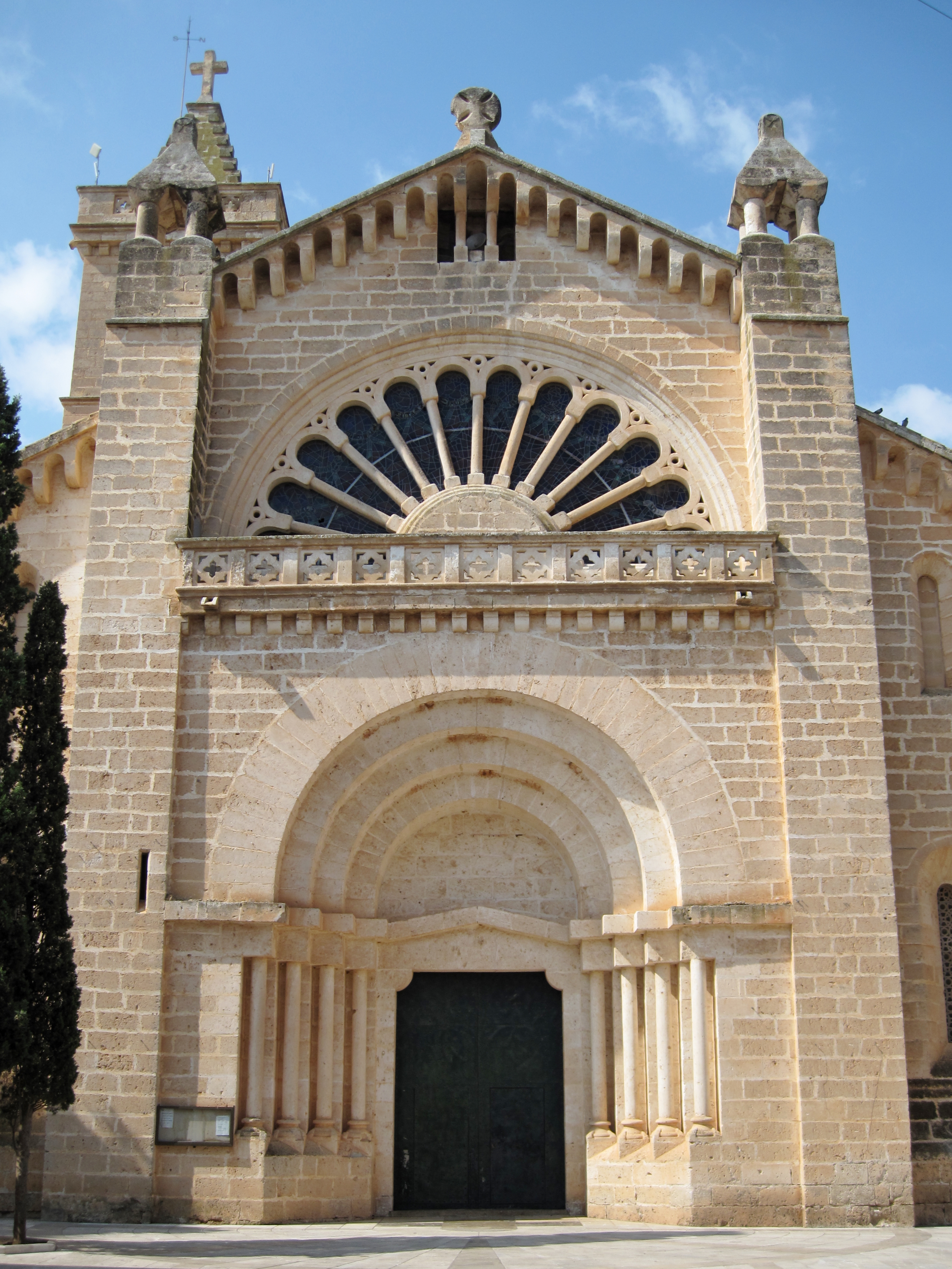 Kirche Sant Miquel in Son Carrió, Mallorca, Spanien